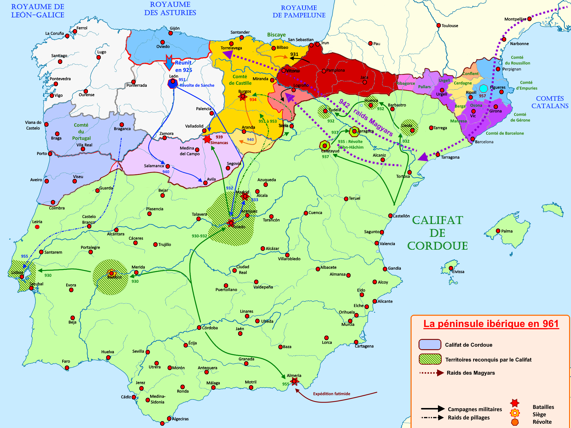 Carte de la péninsule ibérique en 961 illustrant les principaux évènements de l'époque